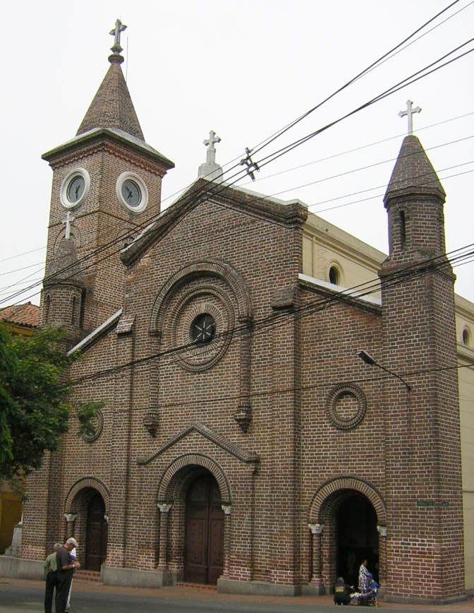 Iglesia de Nuestra Señora del Sufragio, Medellín, Colombia.